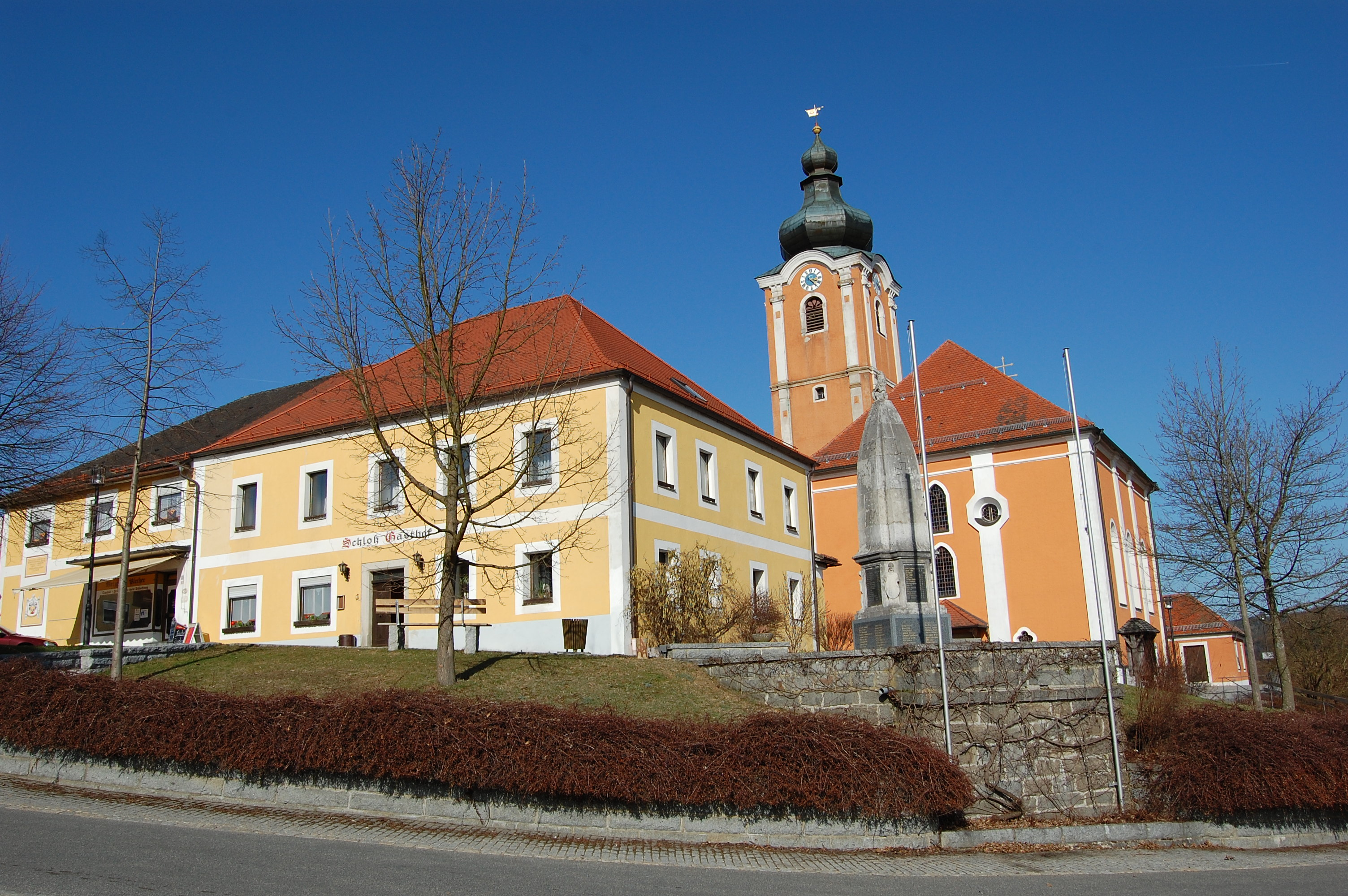 Dieterskirchen, Ortsansicht (2010)